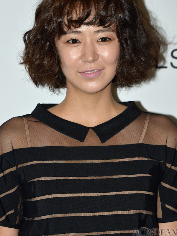 심이영, LG패션 질스튜어트 2013 S/S 컬렉션 행사에서